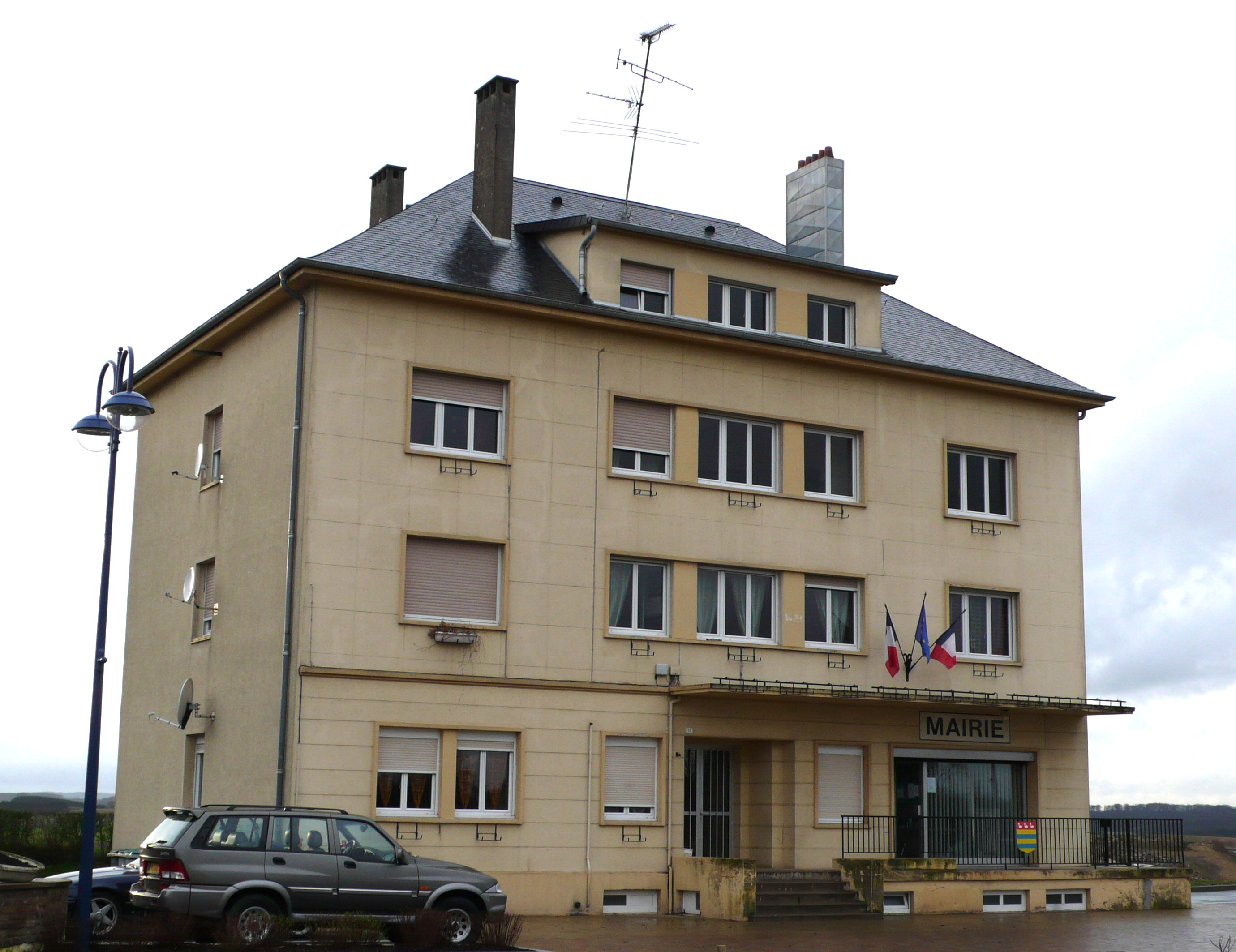 Gemeng Evrange